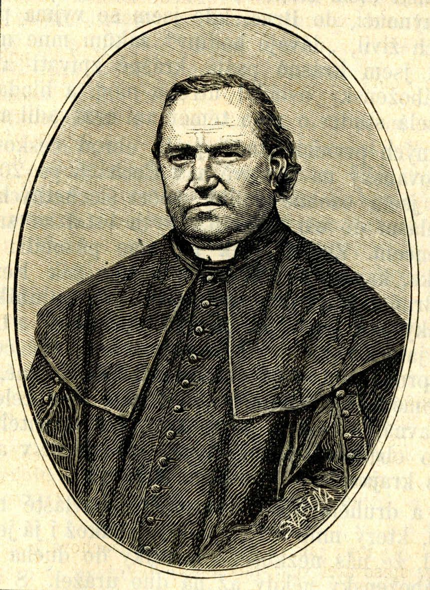 Jan Evangelista Bílý (1819 - 1888), Český římskokatolický kněz, publicista a politik.